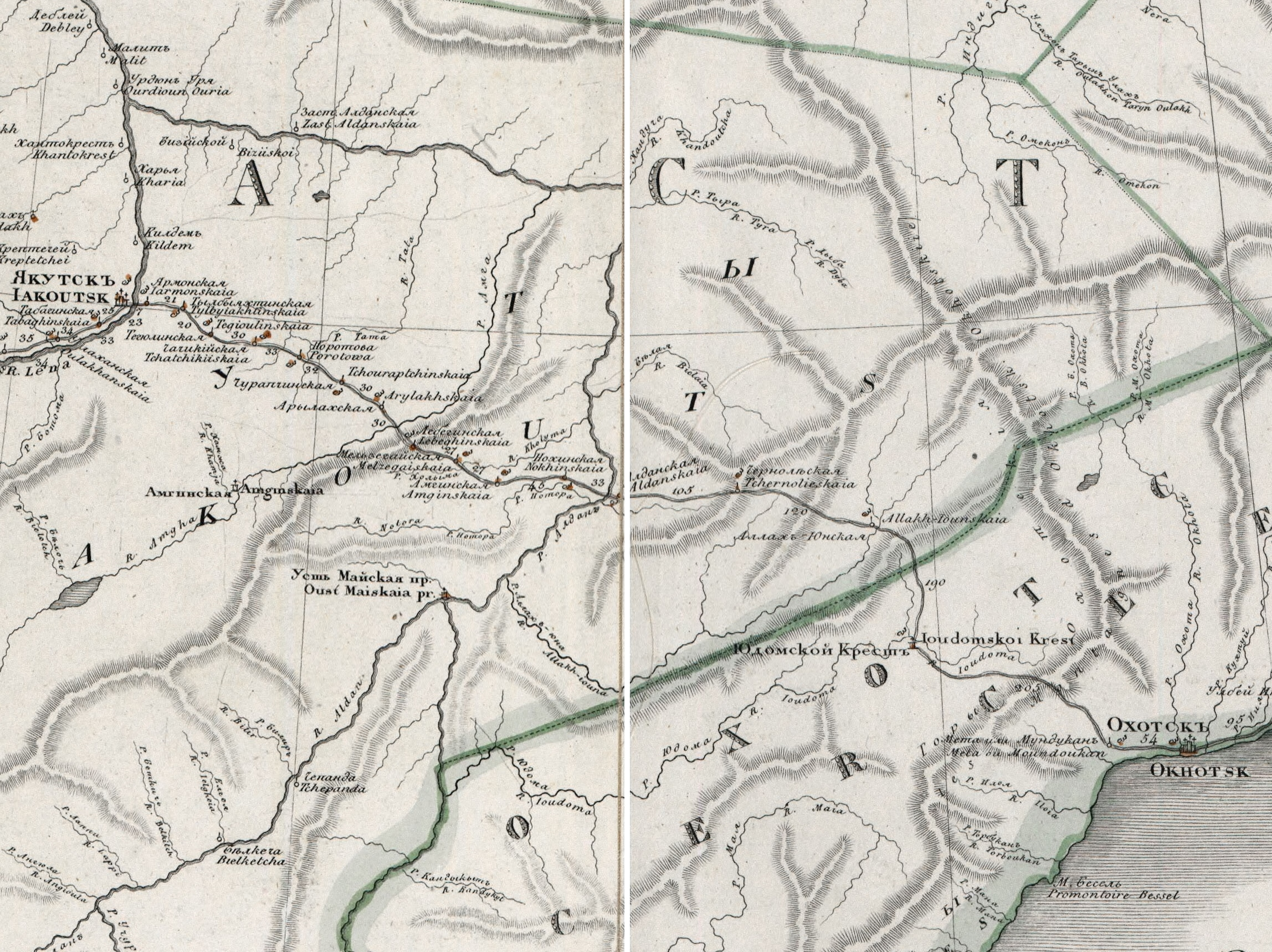 Фрагмент Генеральной карты Якутской области и Охотского округа 1826 года с изображением Охотского тракта